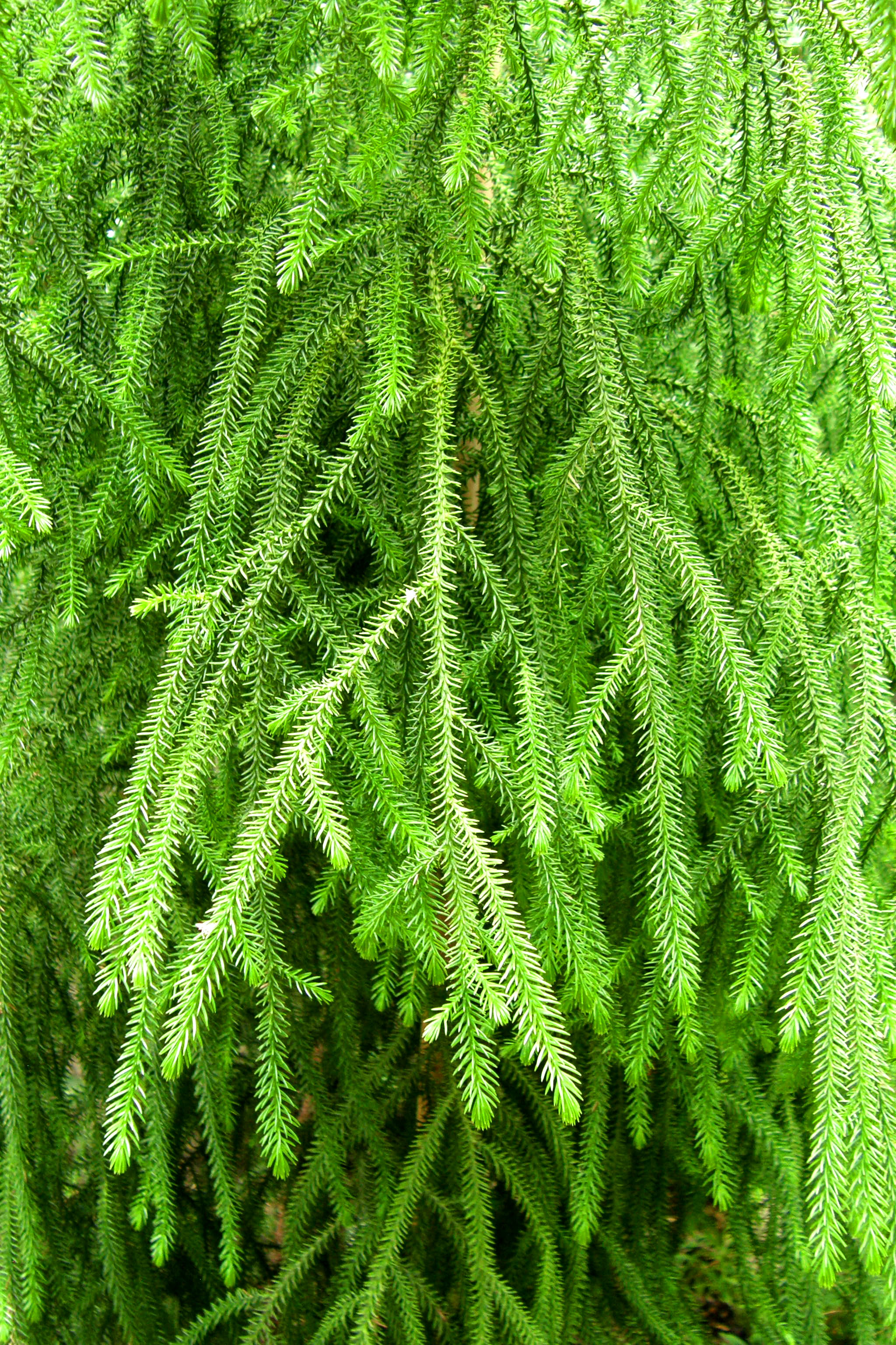 Dacrydium cupressinum Sol (détails) dans la serre du Botanischer Garten de Berlin-Dahlem.